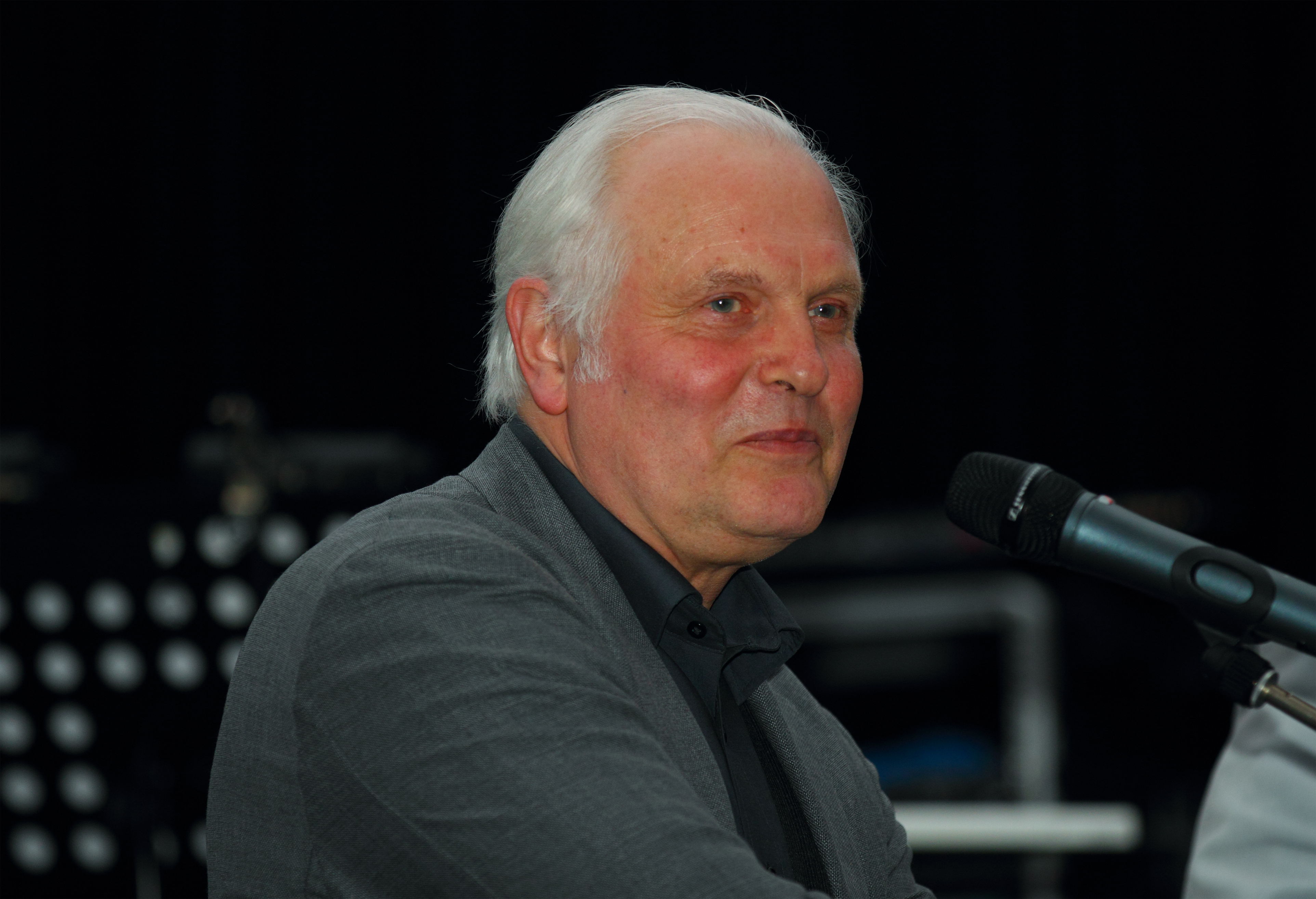 Verleihung des Schallwelle-Musikpreises am 10. März 2012. Kuppel des Planetariums Bochum. Johannes Schmoelling erhält den zweiten Sonderpreis für 2011.